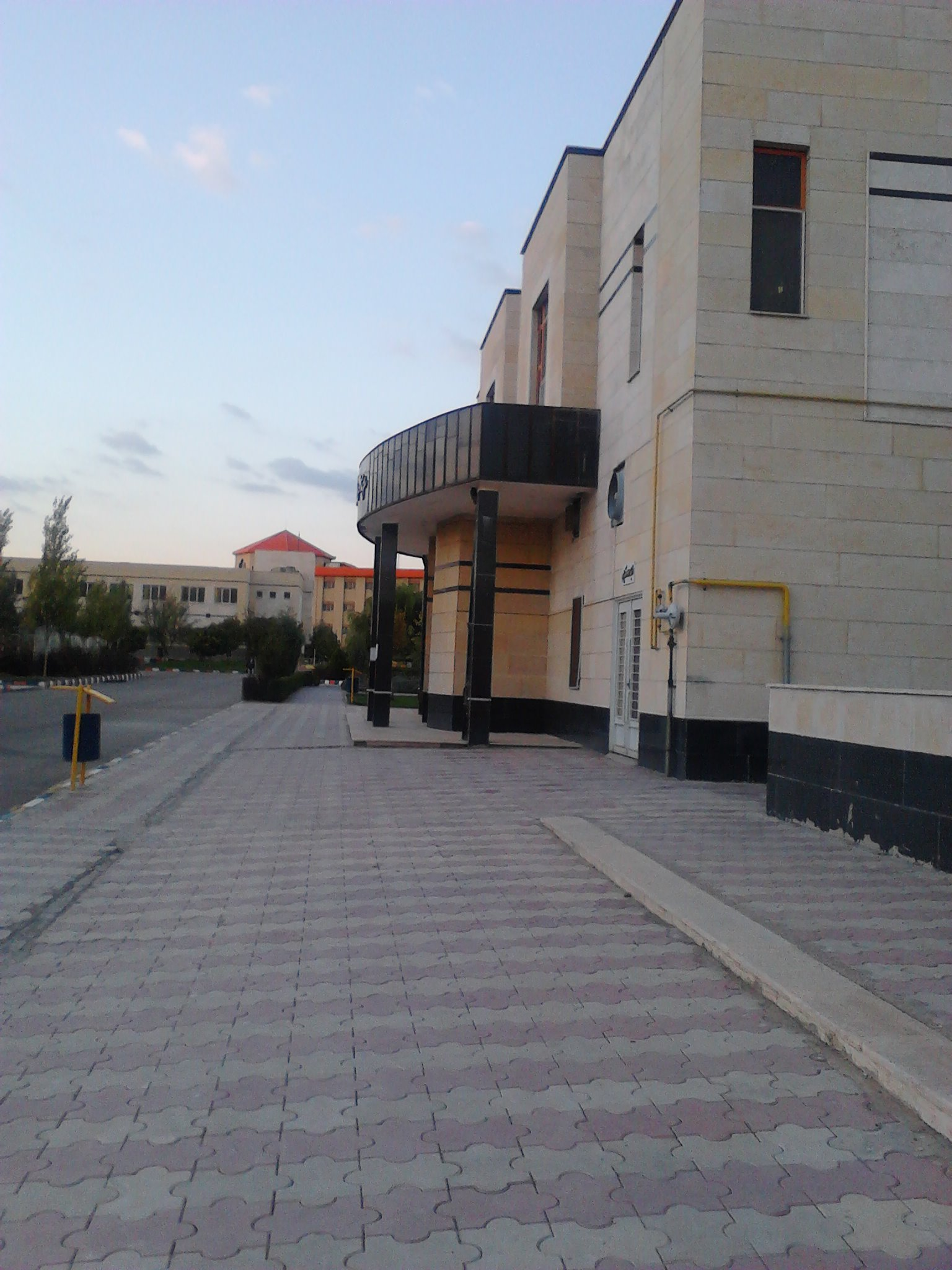 نمای کناری ساختمان سلف دانشگاه